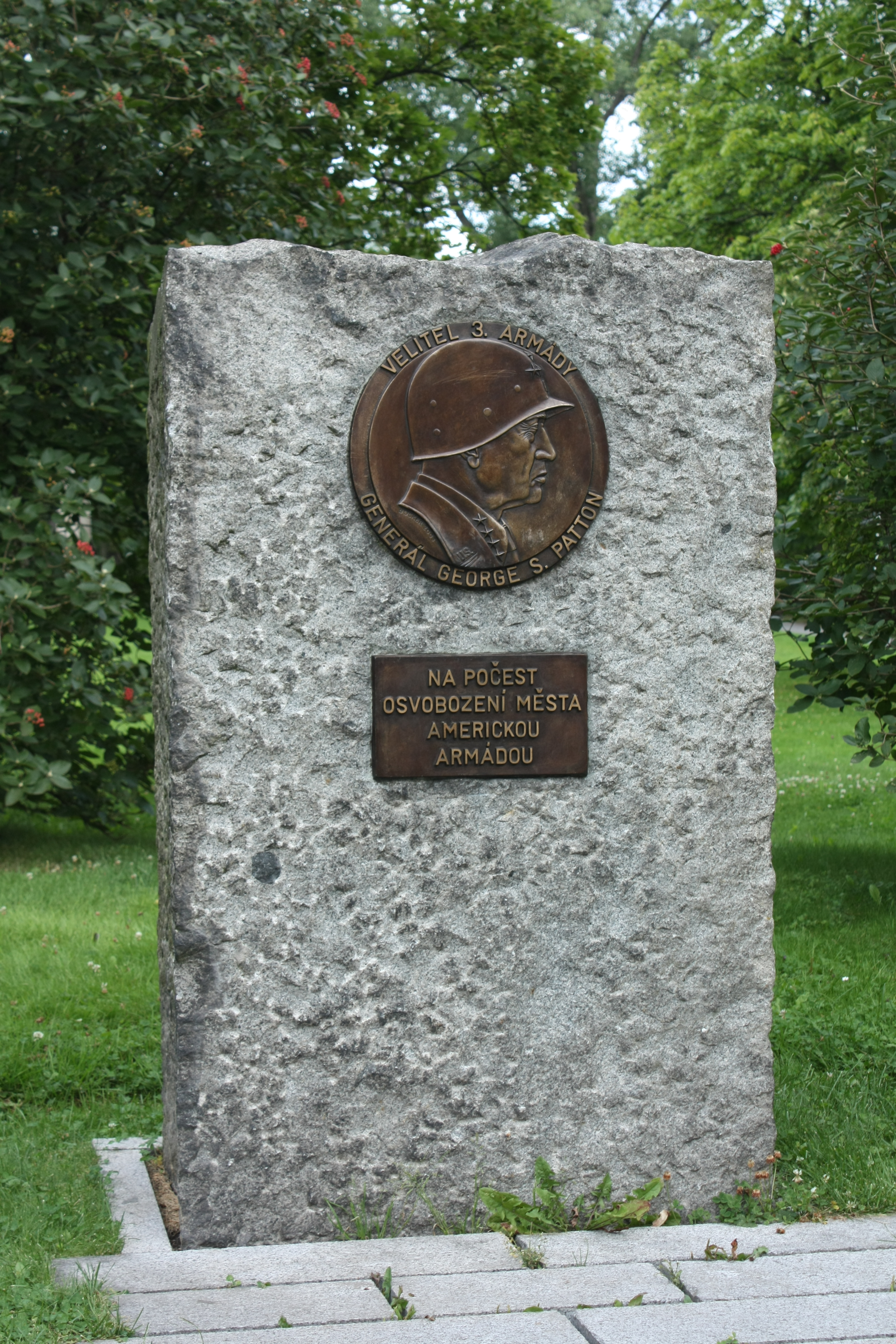 Denkmal für General George_S._Patton im Kurpark von Marienbad‹› Pomník vojákům Americké armády Autor: Marta Nejedlá, 22.04.2009 Umístění: Mariánské Lázně, Masarykova, sady Václava Stehlíka, při ulici Masarykova